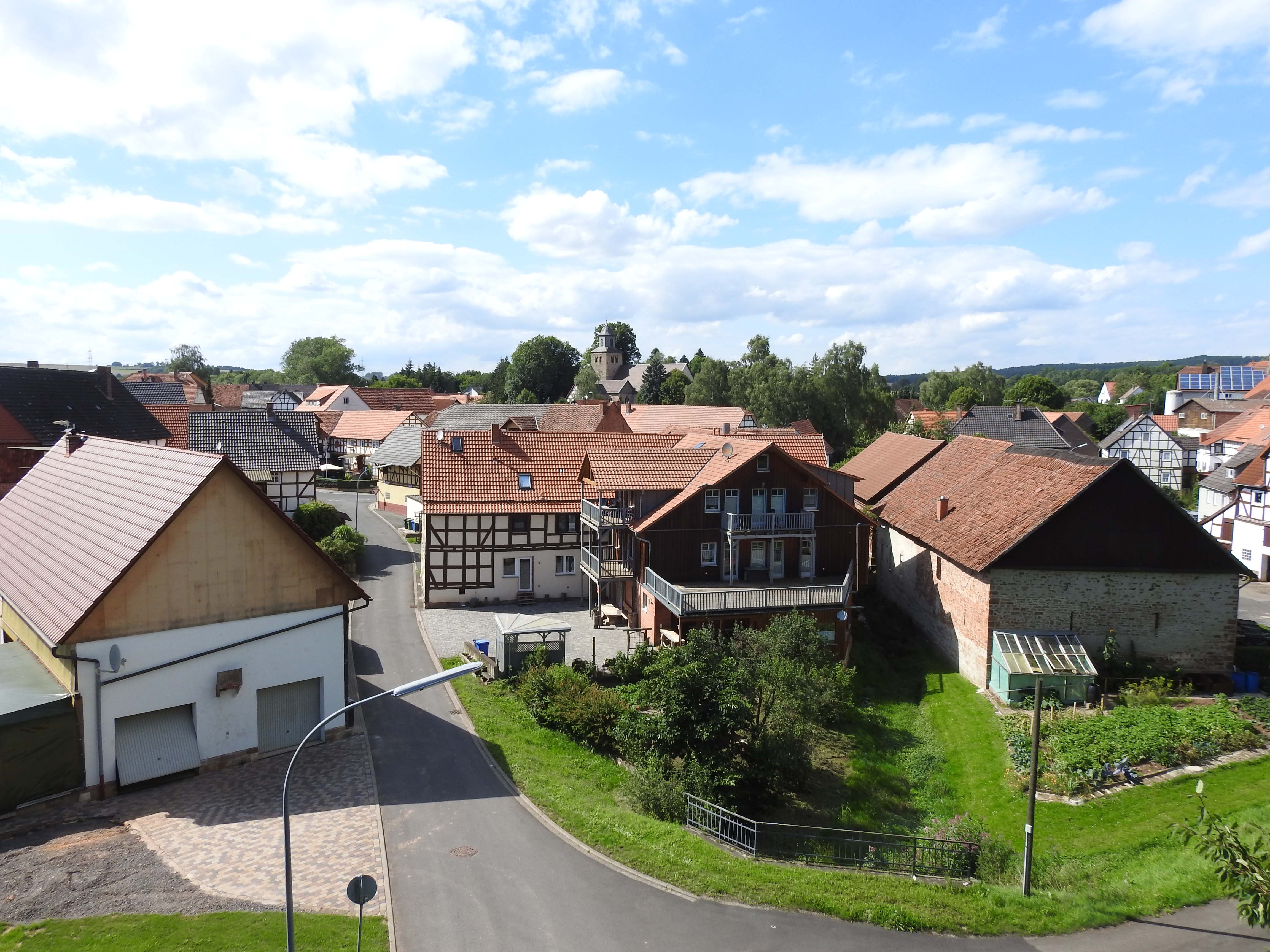 Netze, Waldeck, von Südosten